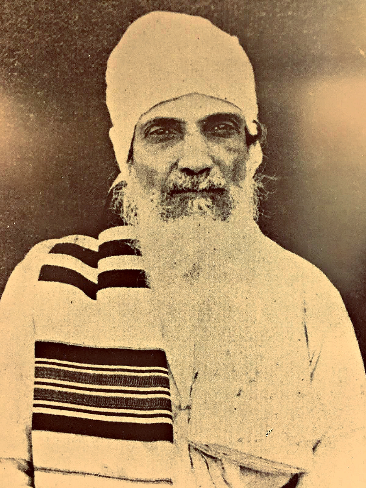 הרב משומר שמואל ניסים